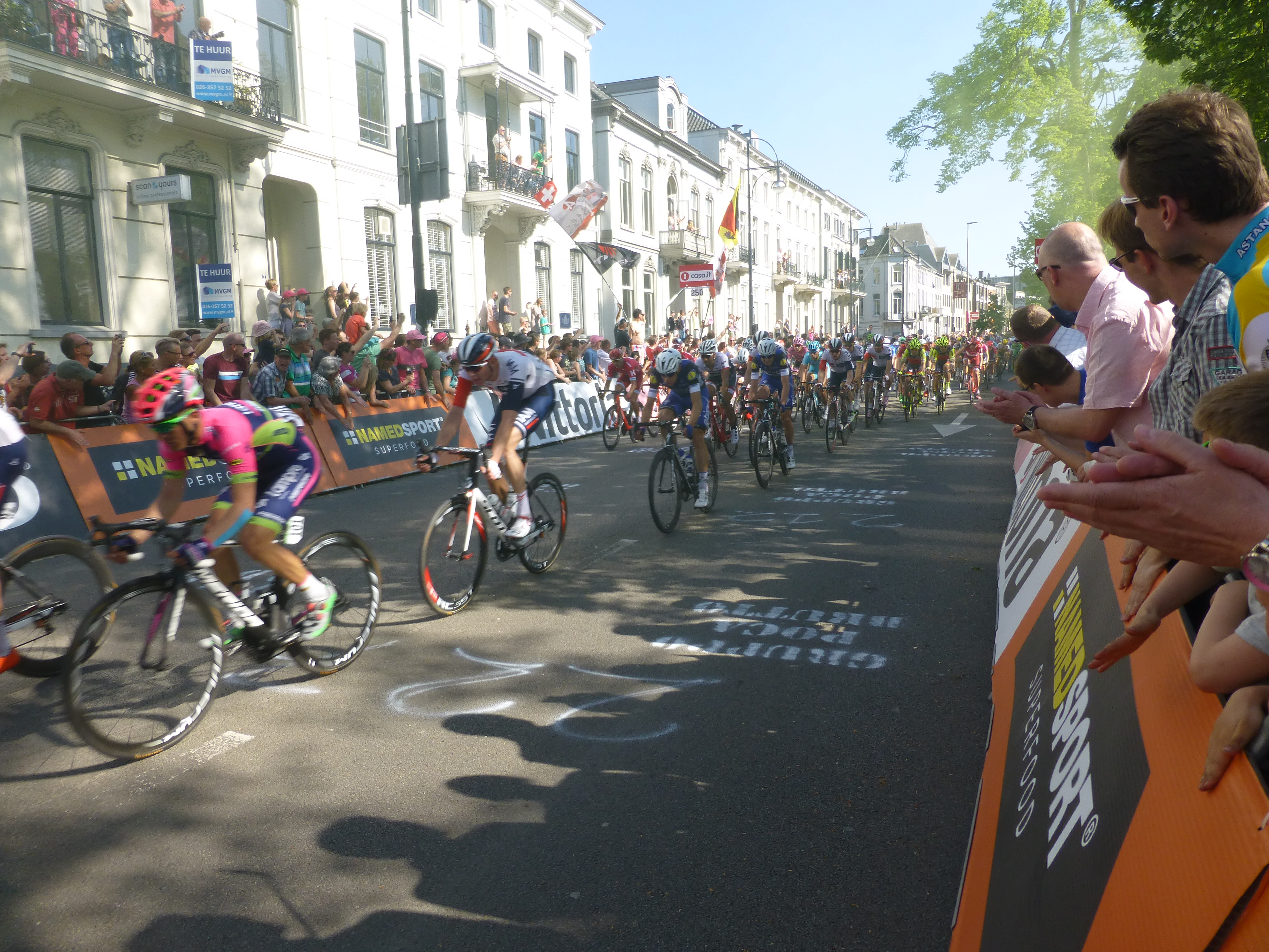 Giro 2016 Arnhem